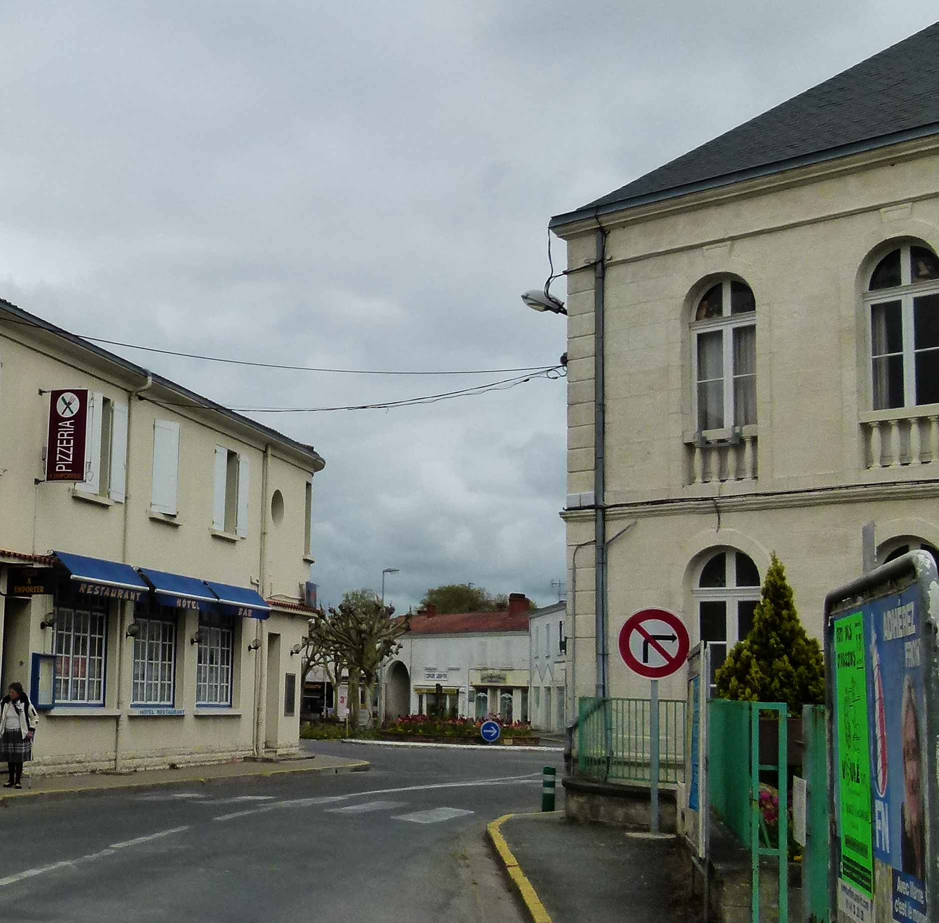 La rue des Marronniers débouche sur la place de la République à Aigrefeuille-d'Aunis avec, à l'angle, la mairie.